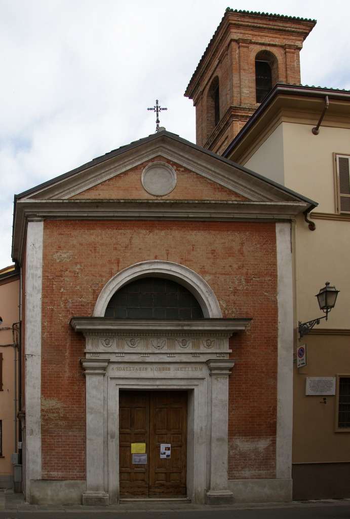 La Chiesa della Buona Morte